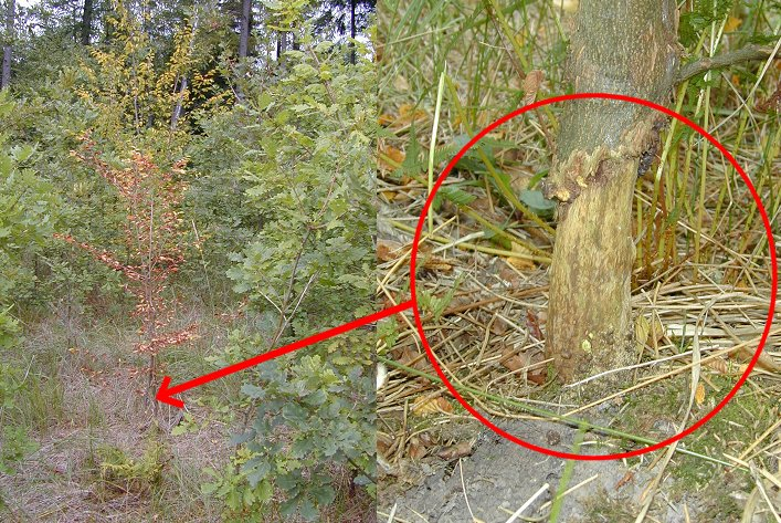 nicht überwallte Ringelung durch Erdmaus an Hainbuche